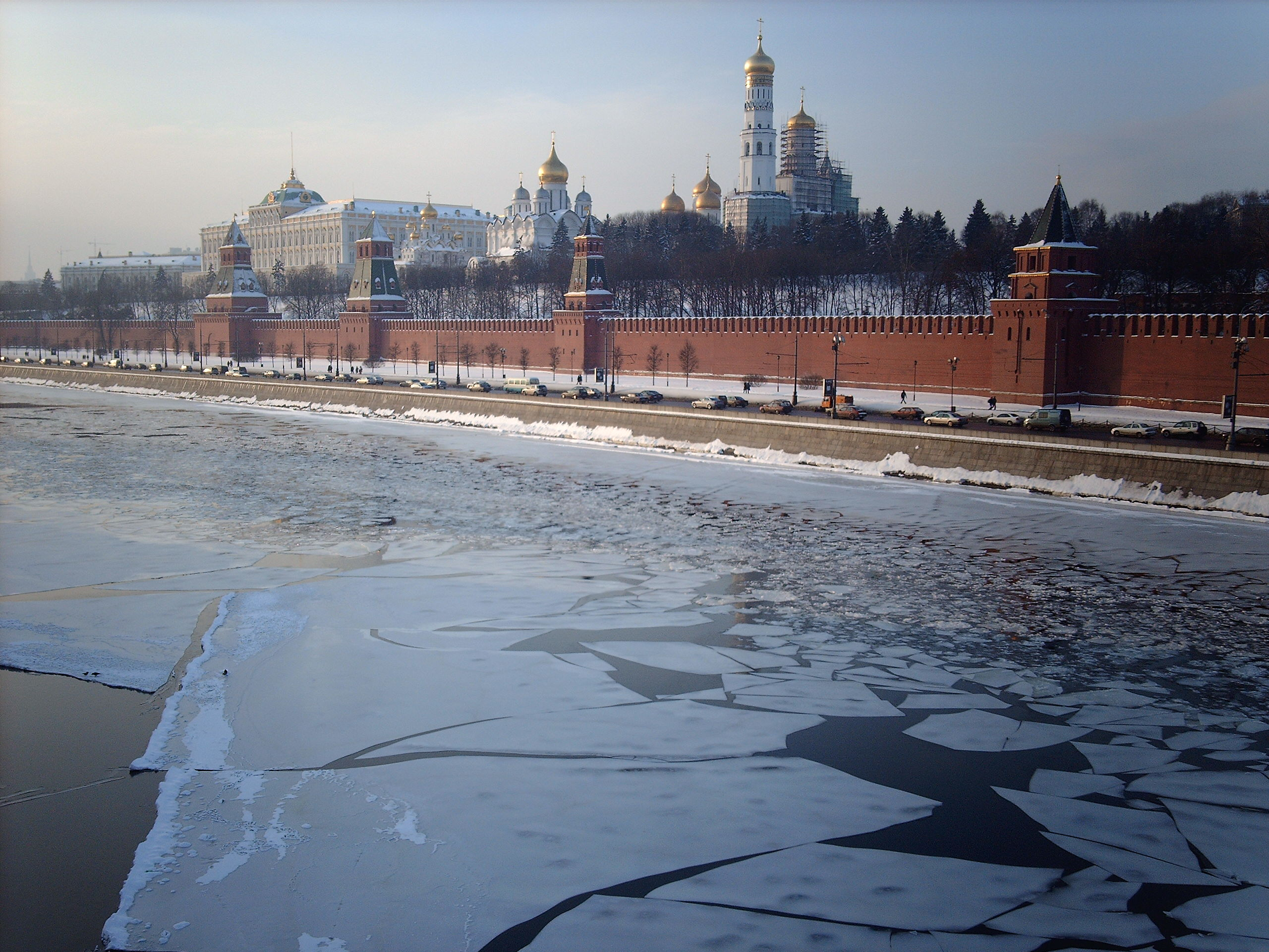 Blick über den vereisten Fluss Moskwa zum Kreml in Moskau